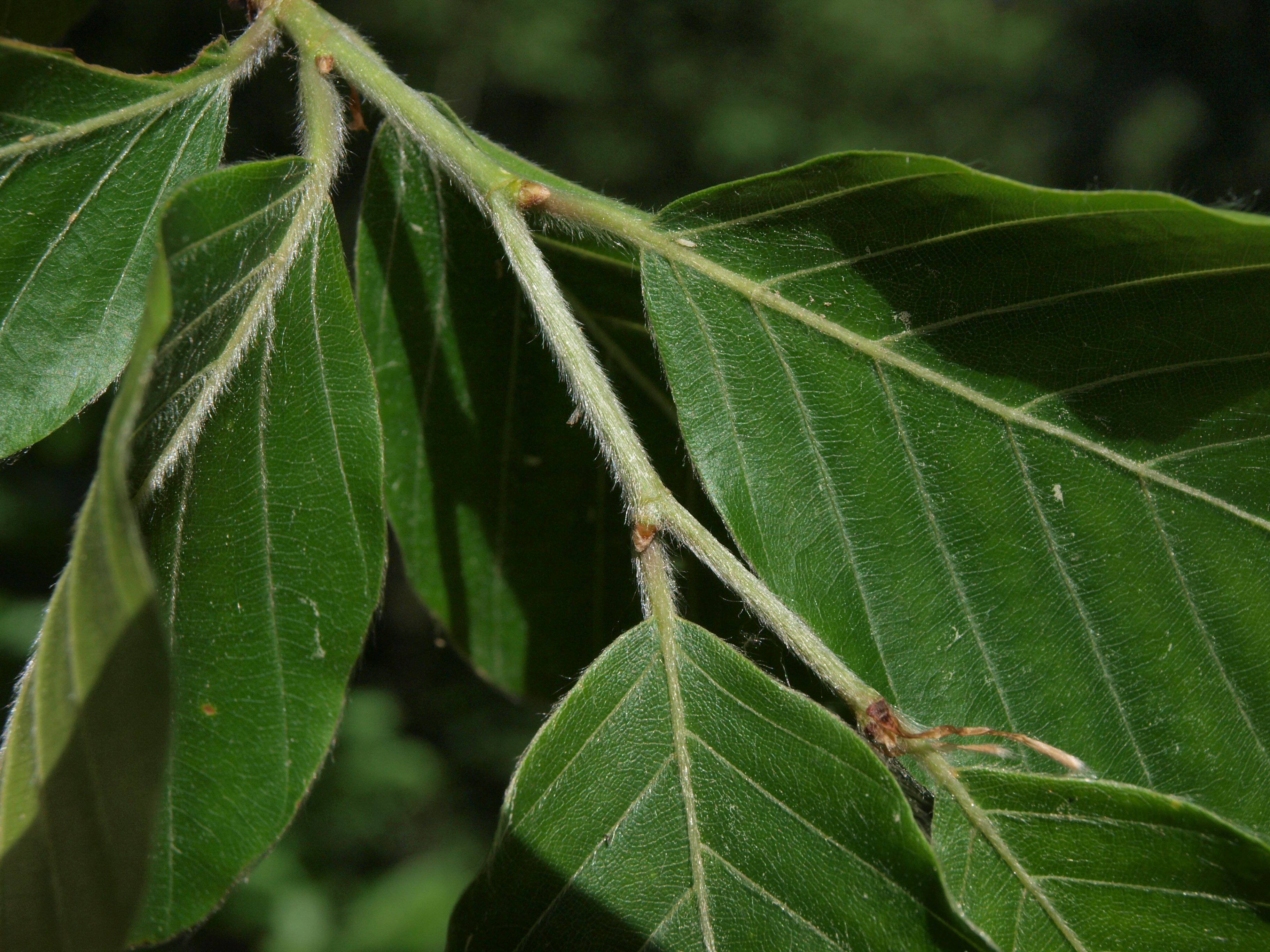 tvorba pupenů buku; fotografie vznikla pro vzdělávací potřeby ČHMÚ